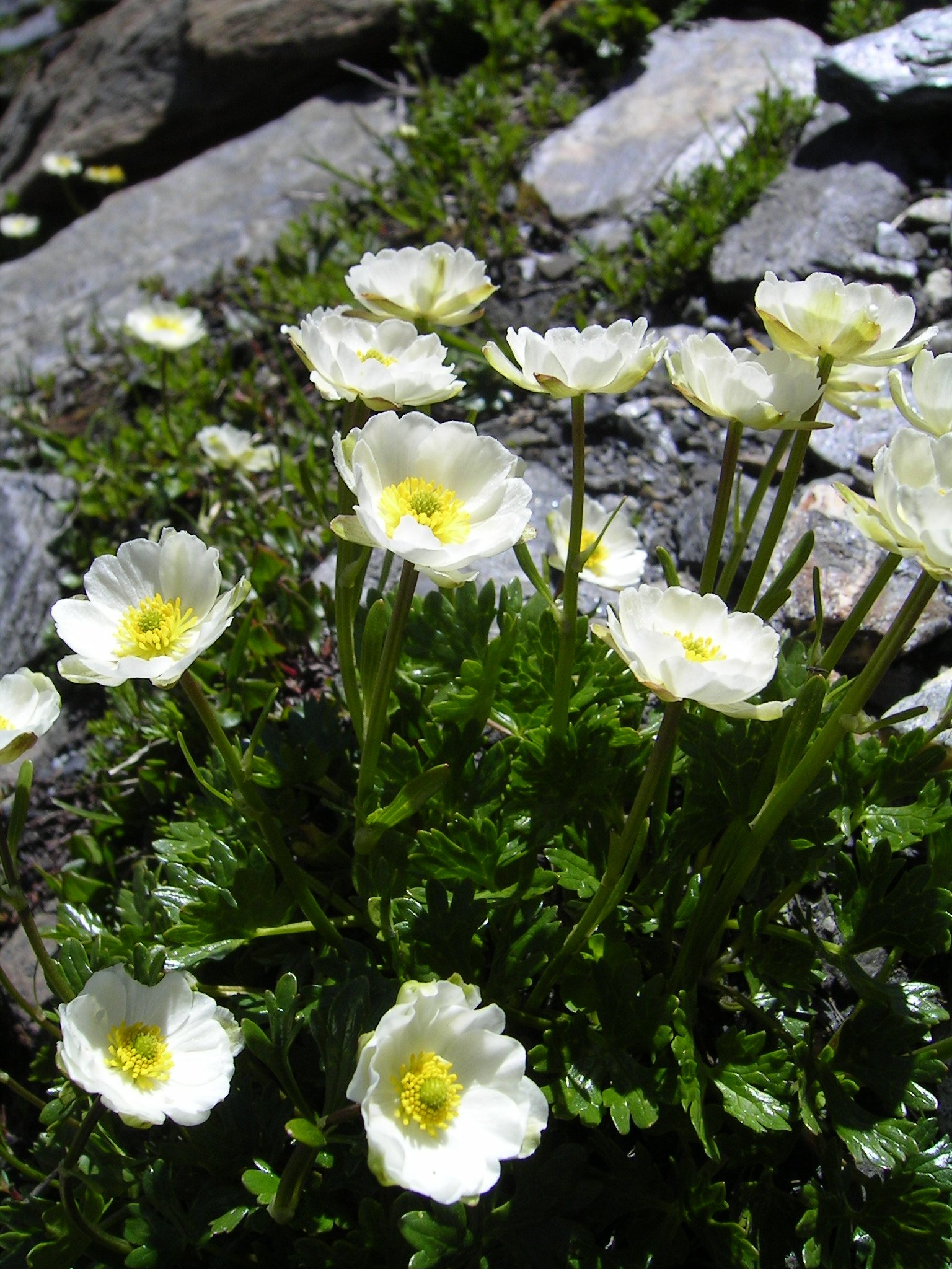 (en) Ranunculus alpestris Place: Switzerland, BE Editing: GIMP (de) Alpen-Hahnenfuss (Ranunculus alpestris) auf Schiefer Aufnahmeort: Berner Oberland, Schweiz Bearbeitung: keine